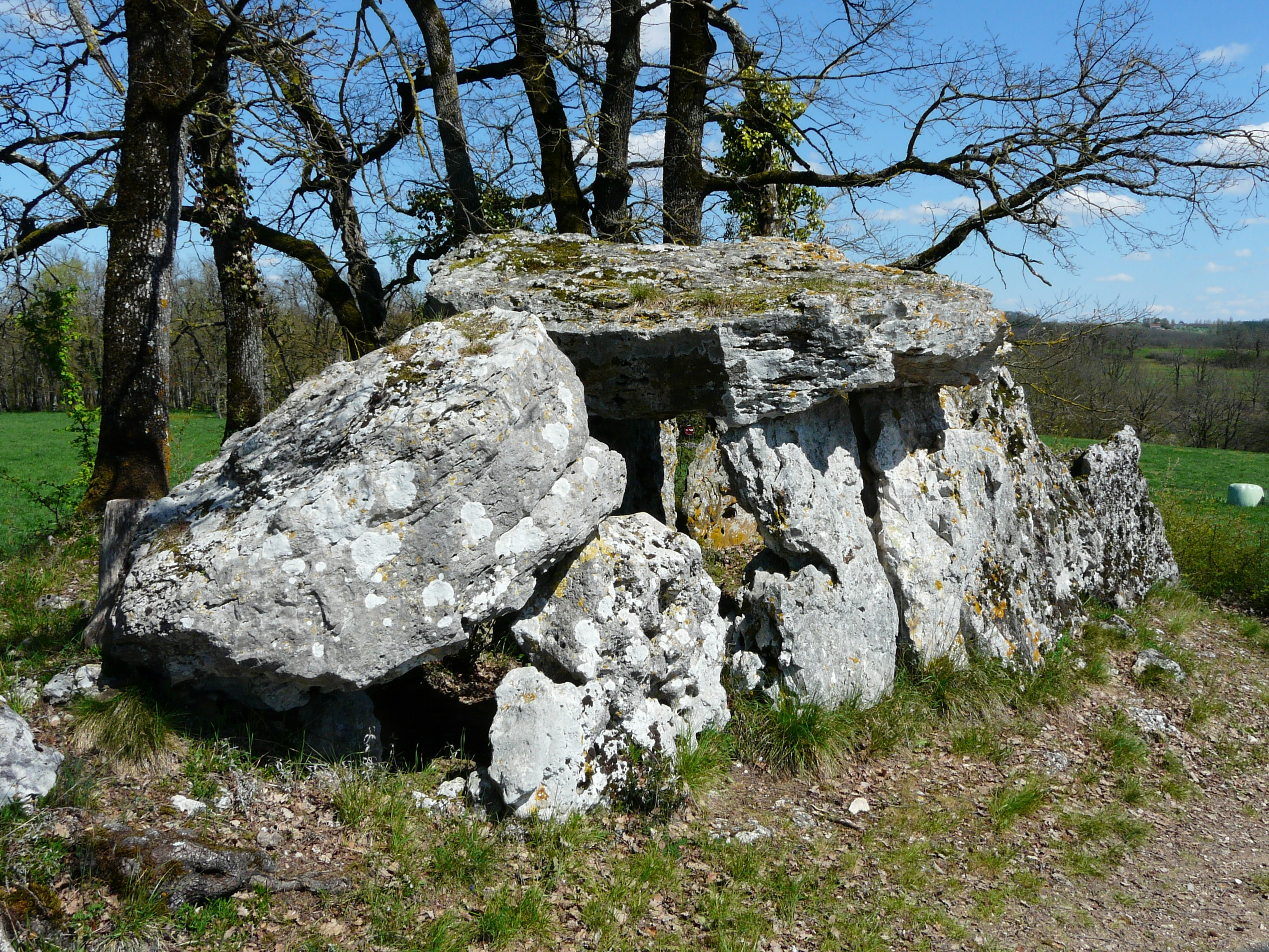 L'allée couverte du Blanc, Nojals-et Clotte, Dordogne, France.